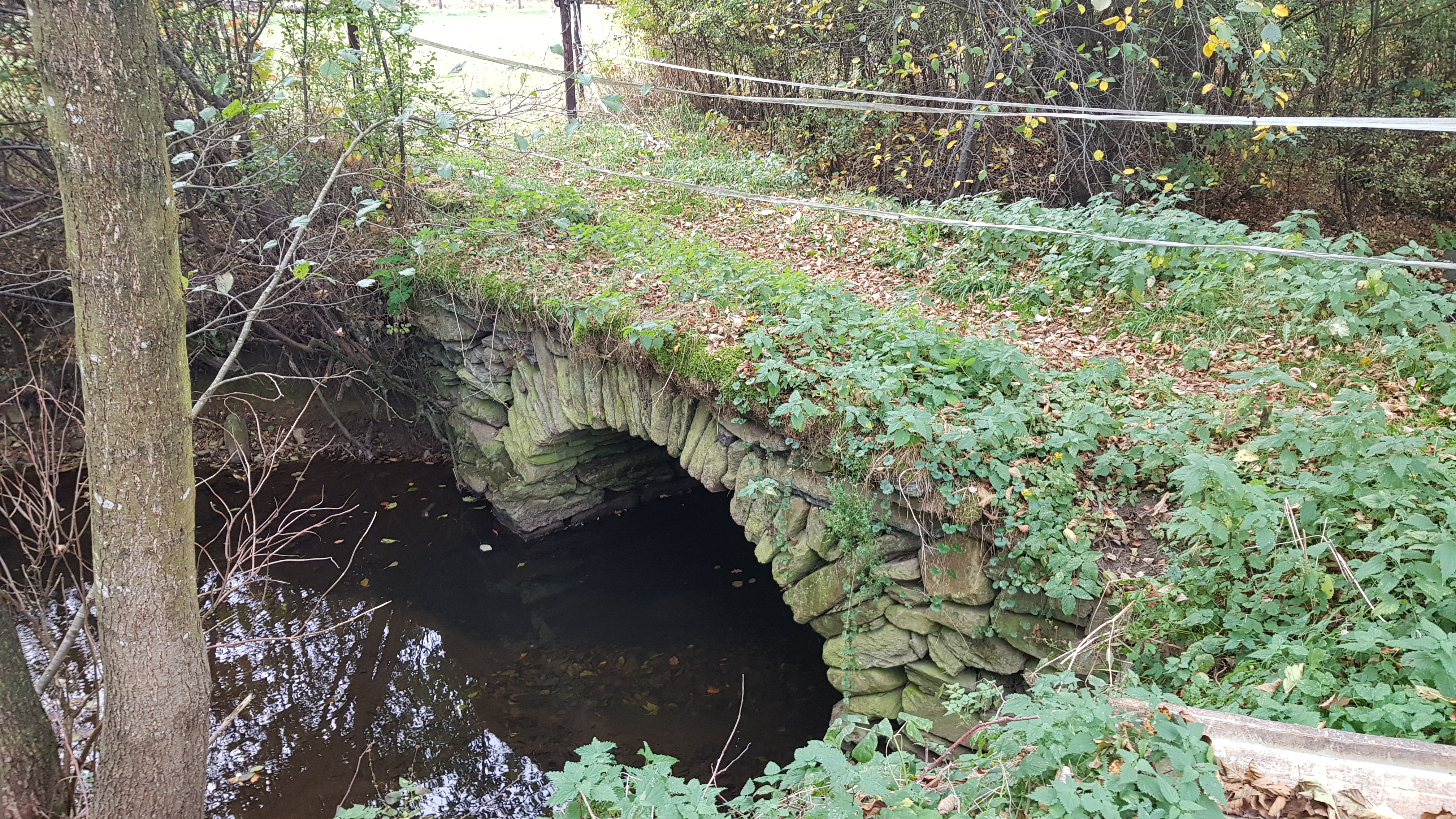 Schafsbrücke bei Am Büchel, Recht, Sankt Vith, Belgien This photo of immovable heritage has been taken in the Walloon Region